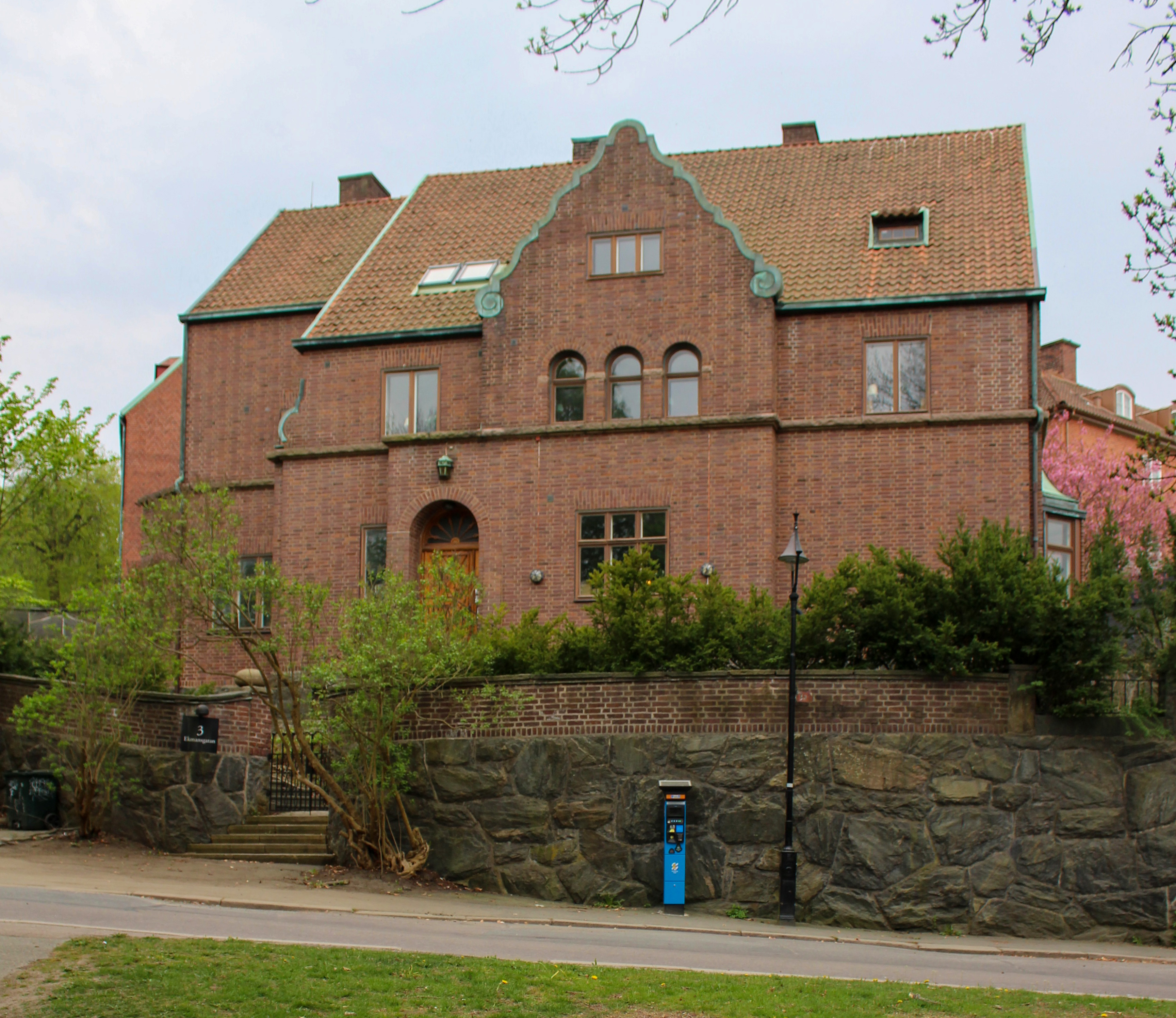 Församlingsfakulteten från norr.